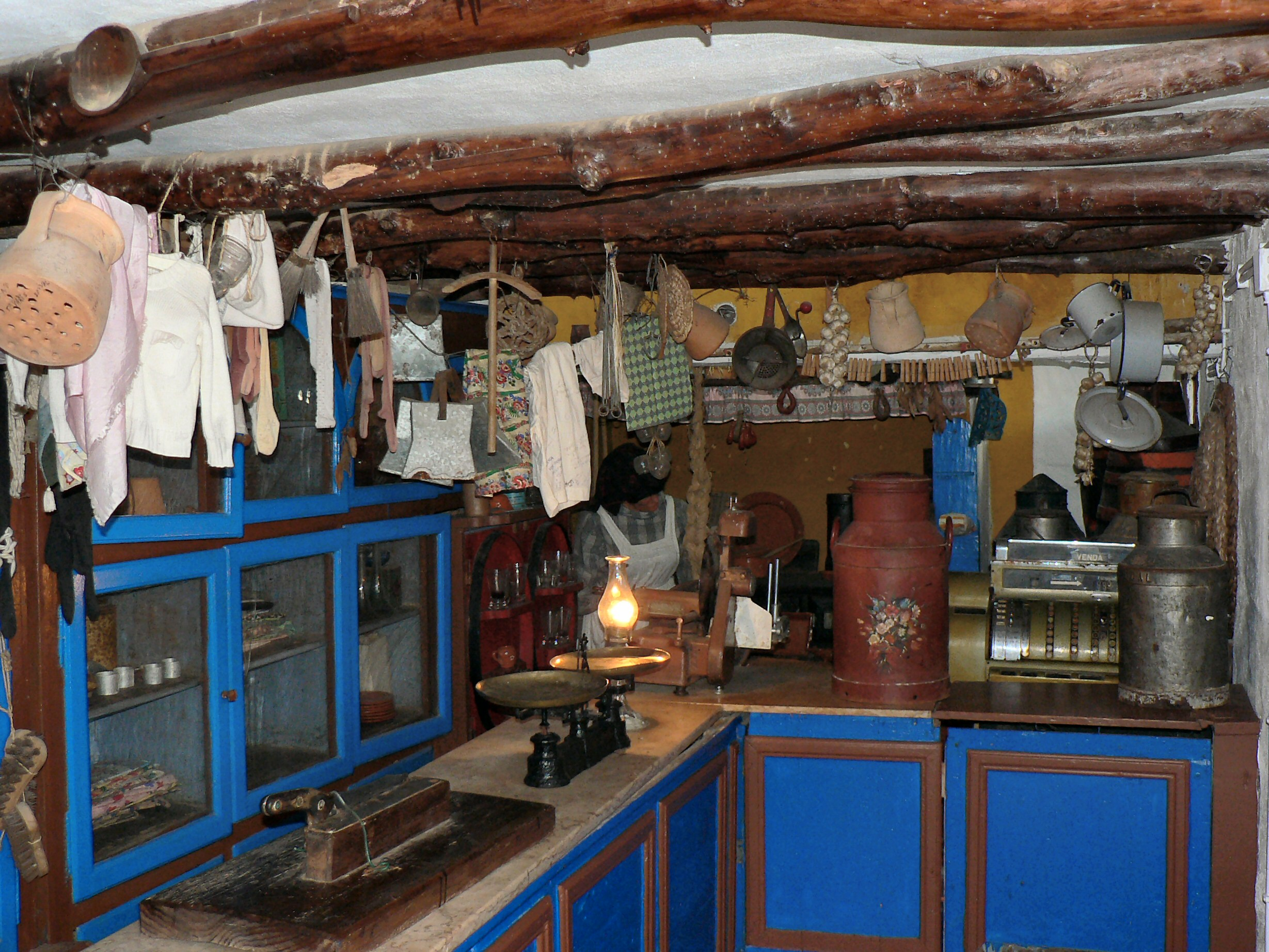 Aldeia típica de José Franco - A loja da Ti Lena - interior Autor: Paulo Juntas